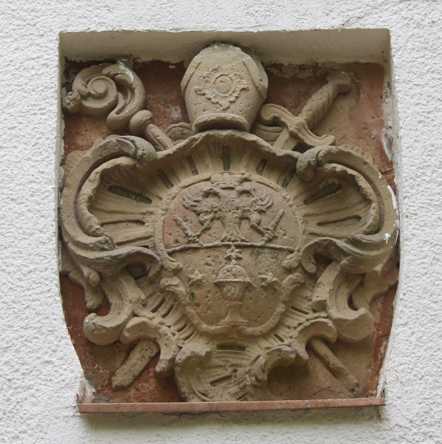 südwestlich von Borler auf dem Heyerberg: sogenannte Borler Kapelle Wappen der Reichsabtei St. Maximin (Trier)